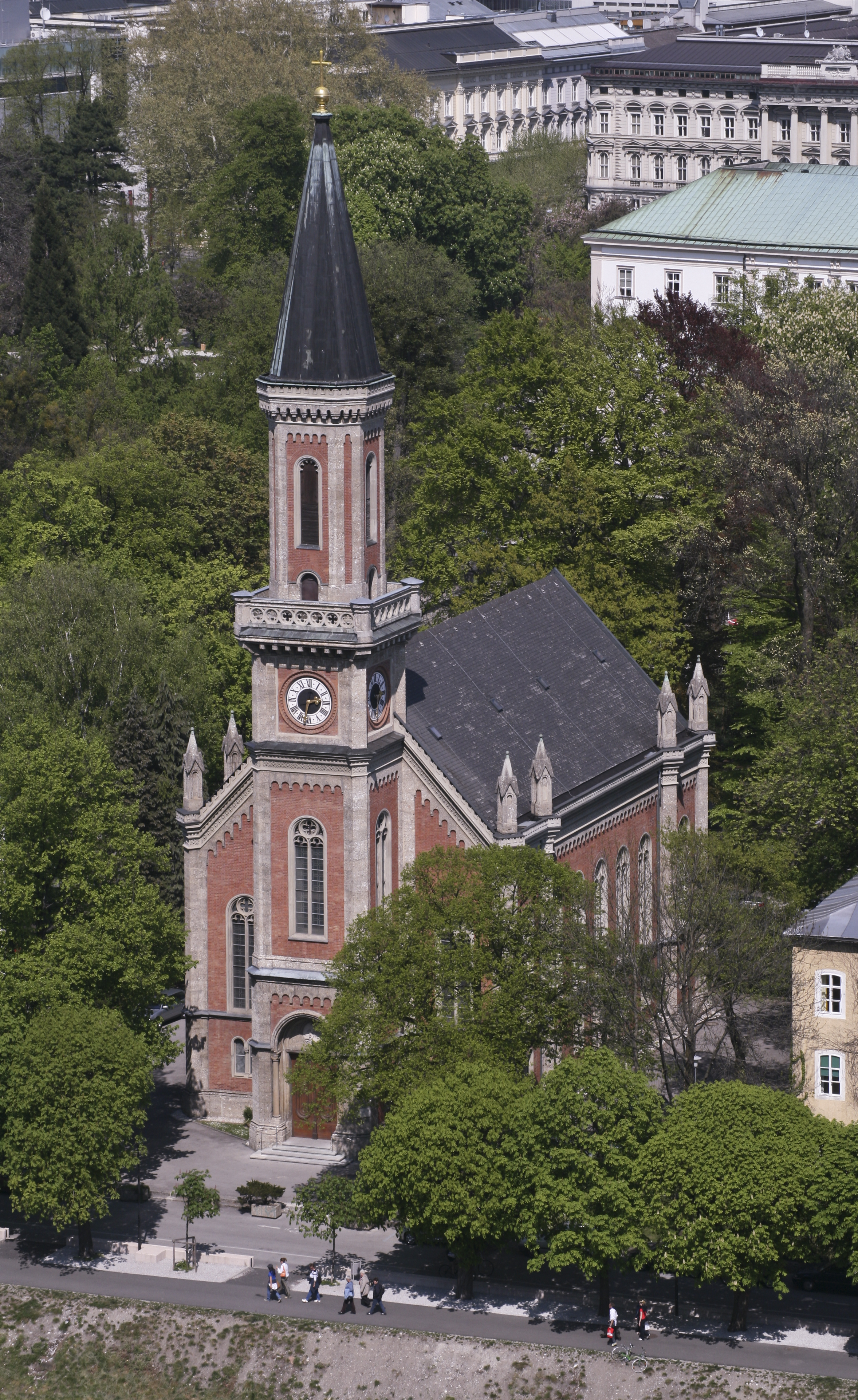 Evang. Pfarrkirche A.B., Christuskirche